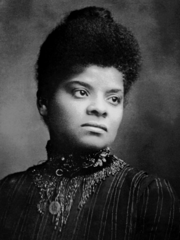 Ida B. Wells